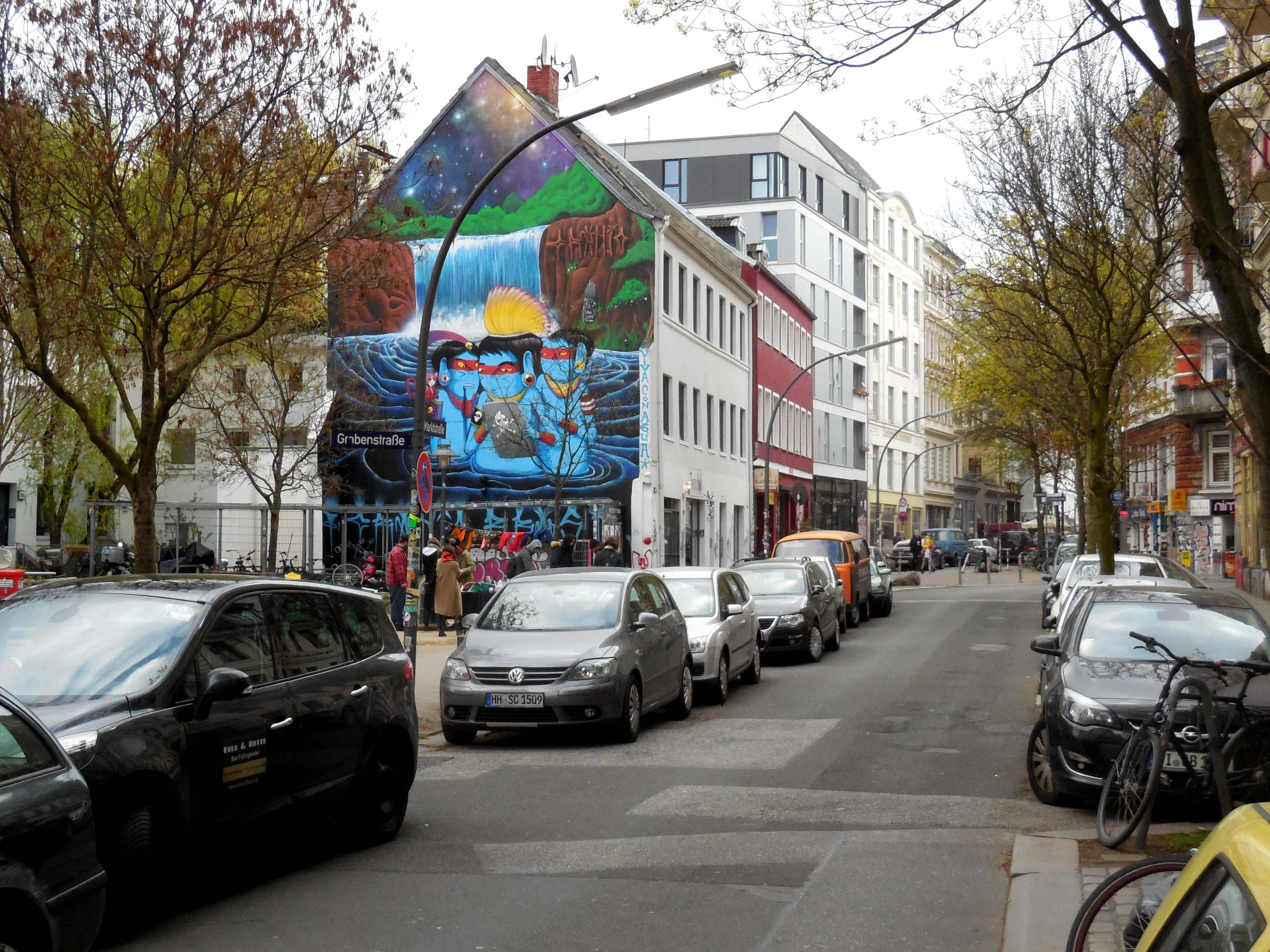 Haus Nr. 126 mit Graffiti in der Marktstraße, Hamburg